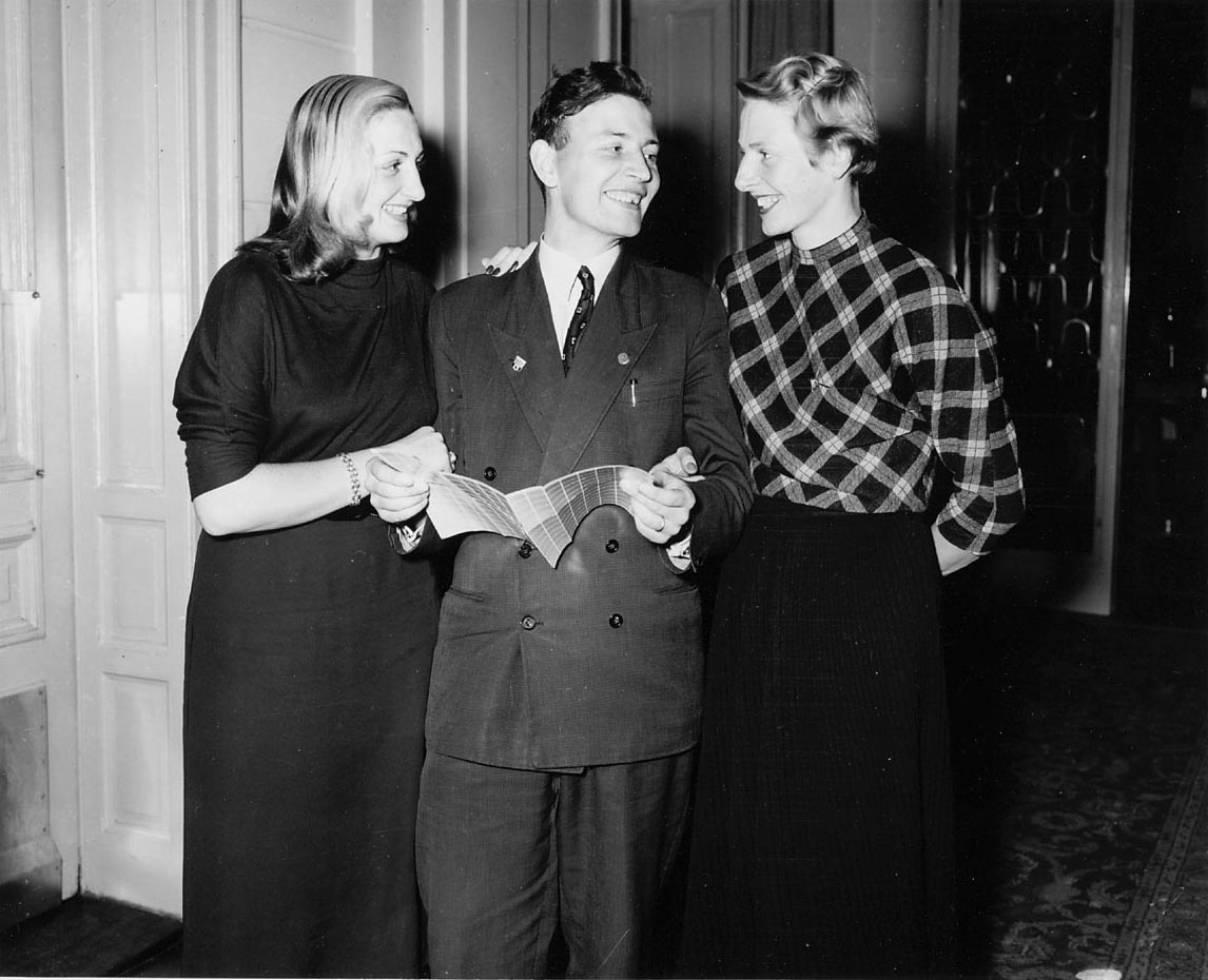 Sterren verkopen postzegels t.b.v. de Ned. Stichting voor het gebrekkige kind, de Mytylstichting. Hannie Termeulen (links), Abe Lenstra (midden) en Fanny Blankers-Koen (rechts), Amsterdam, 28 oktober 1952 Foto Ben van Meerendonk / AHF, collectie IISG, Amsterdam